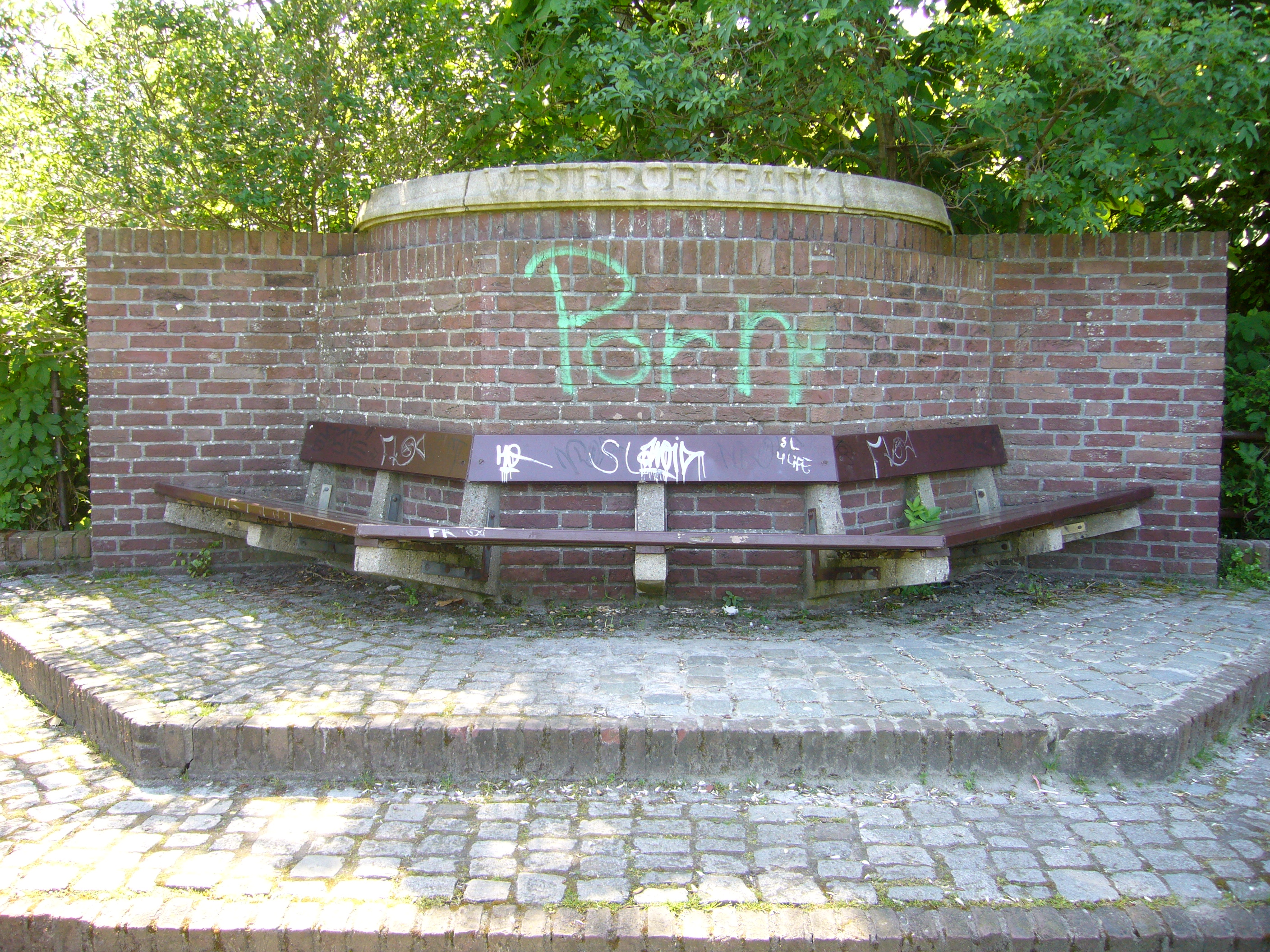 Dirk Roosenburg: Westbroekbank in het Westbroekpark, Den Haag